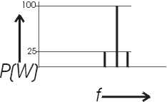 Spectrum AM signaal met amplitude aanduidingen